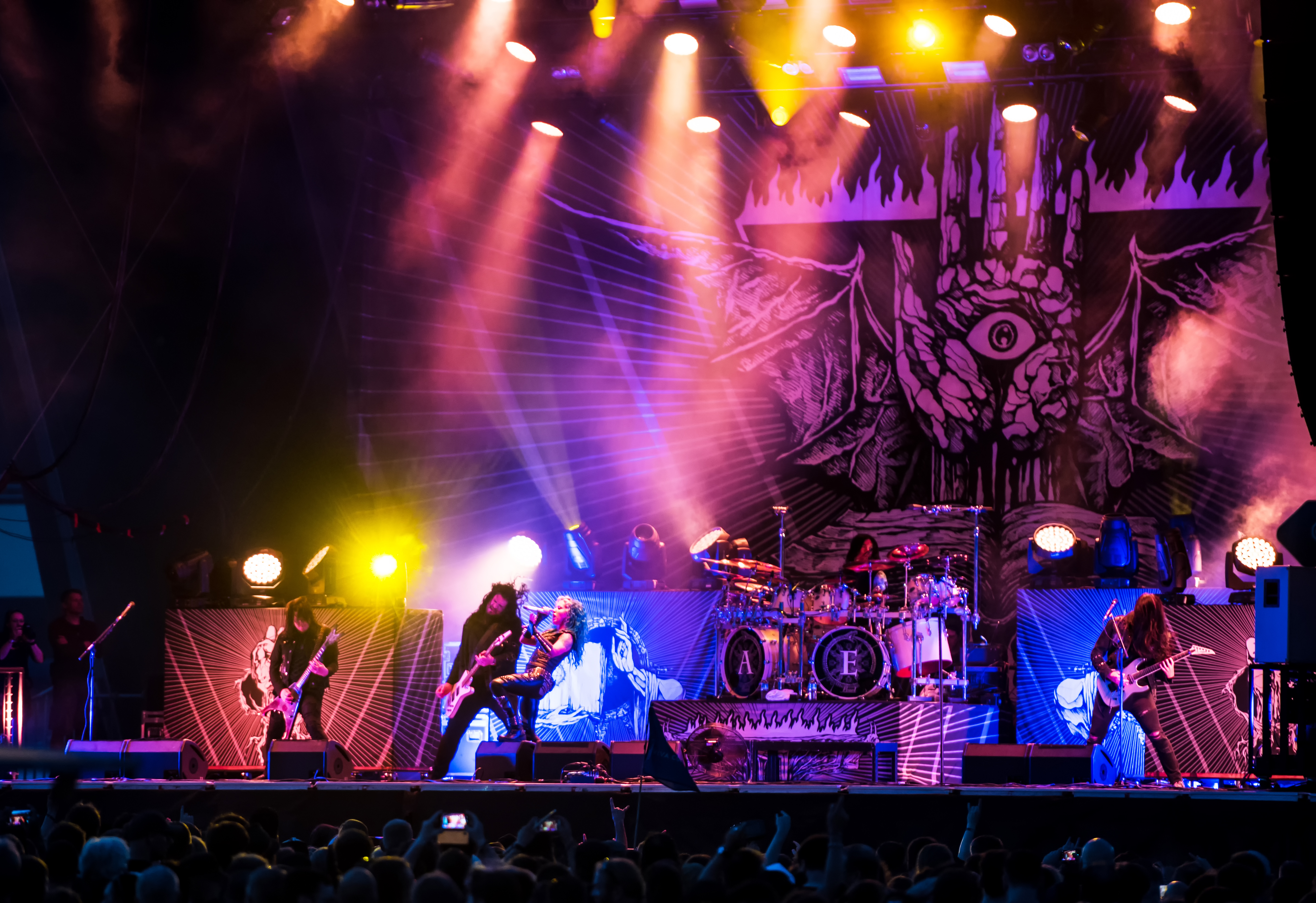 Arch Enemy beim Elbriot 2018